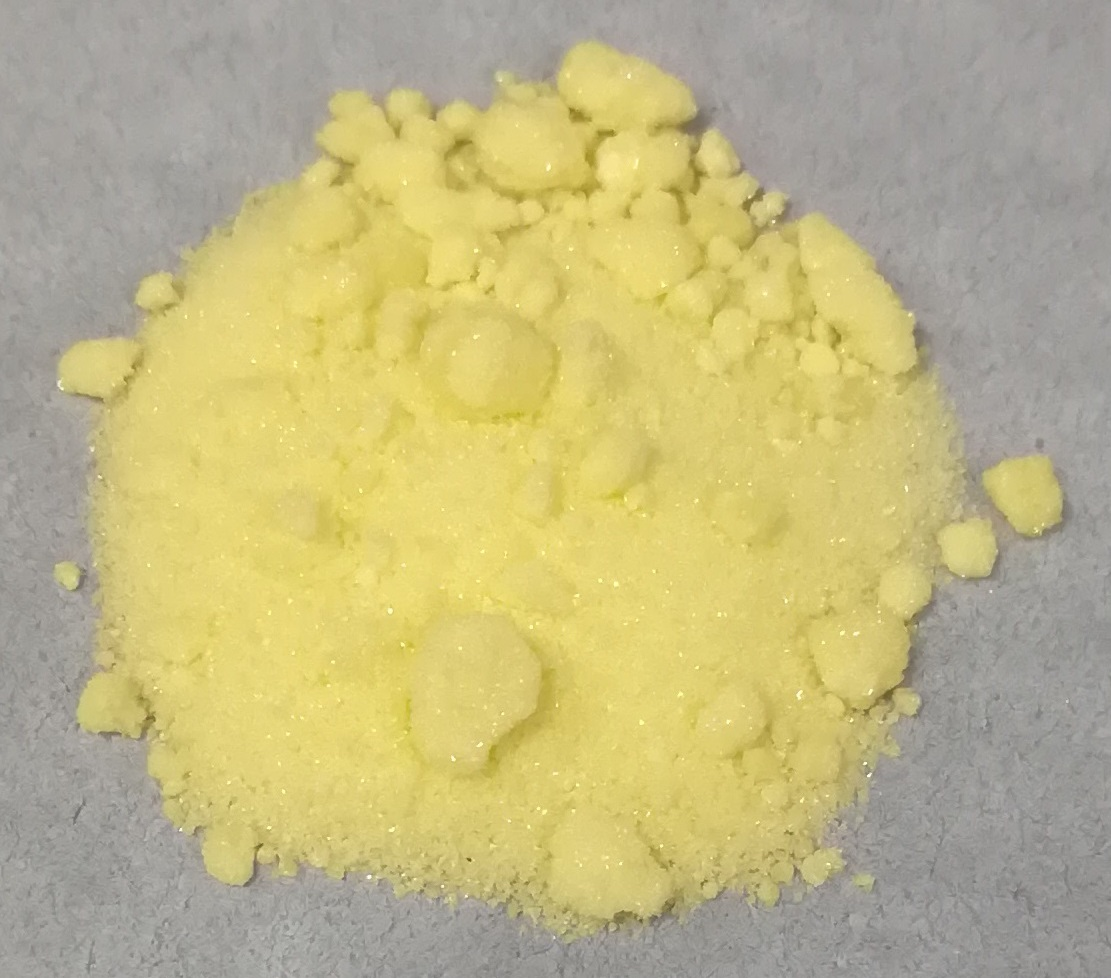 中文（中国大陆）: 乙酸钬(III)的样品 吴语: 醋酸钬个样品